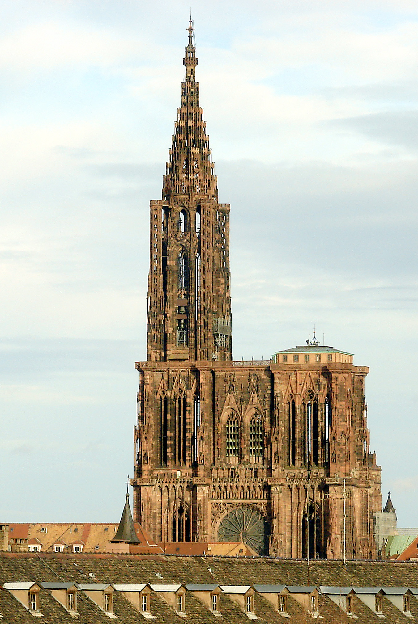 Vue de la facade Nord de la Cathédrale de Strasbourg